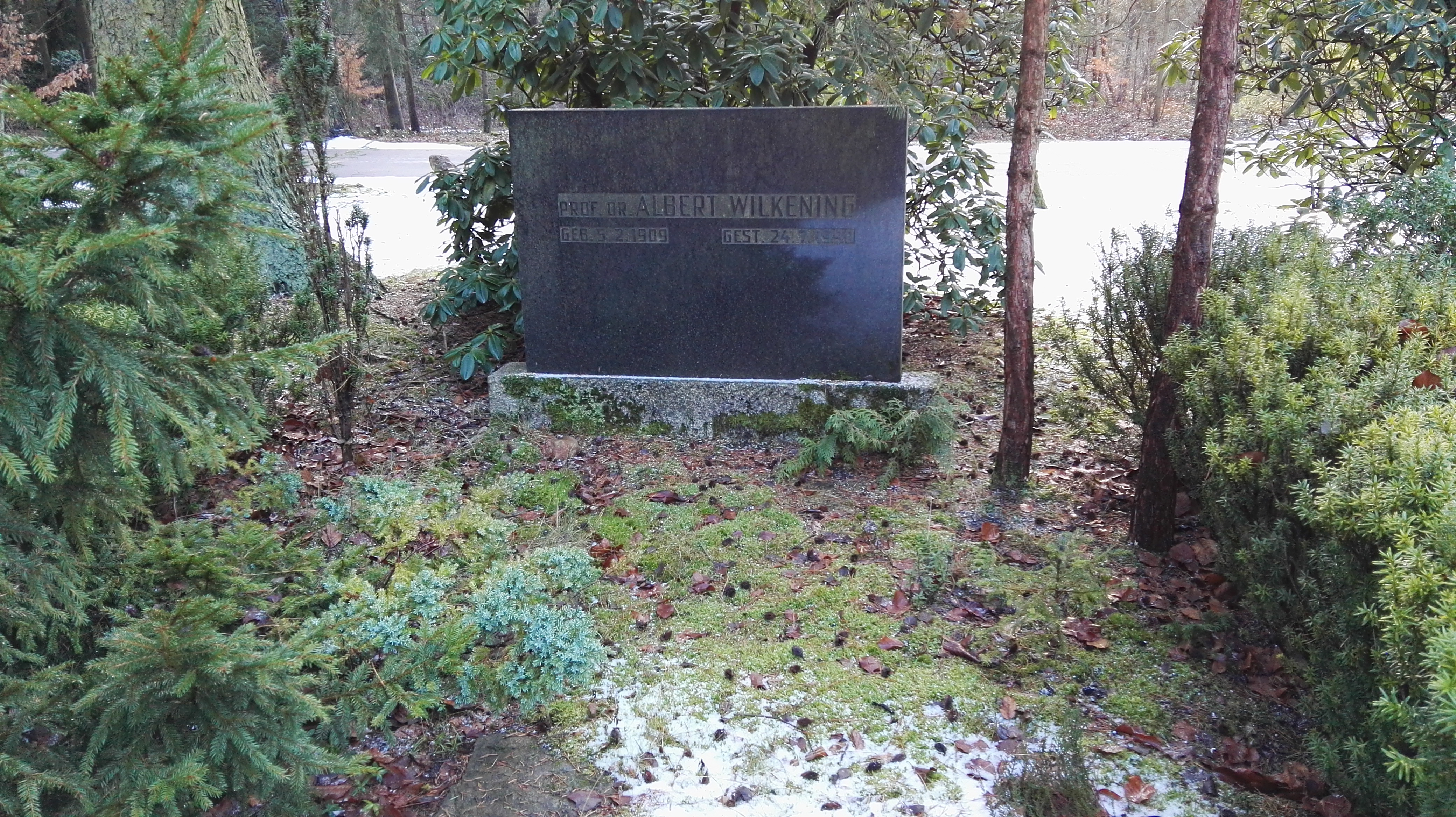 Grab von Albert Wilkening auf dem Südwestkirchhof Stahnsdorf